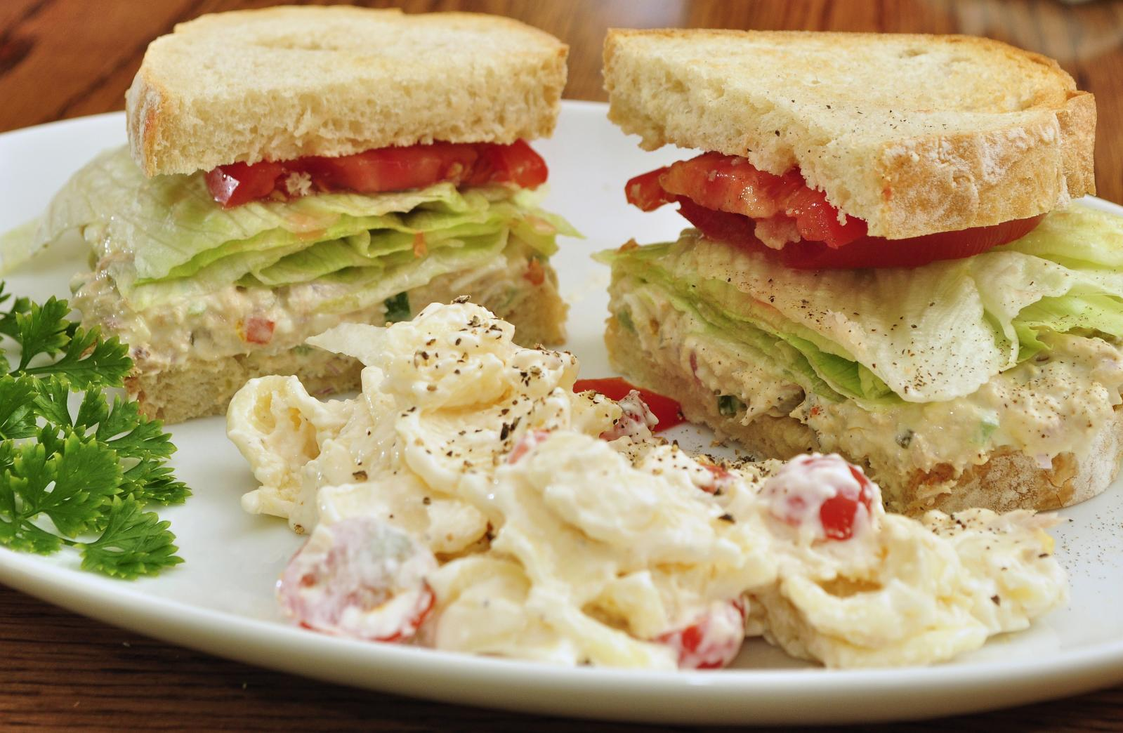 A tuna salad sandwich